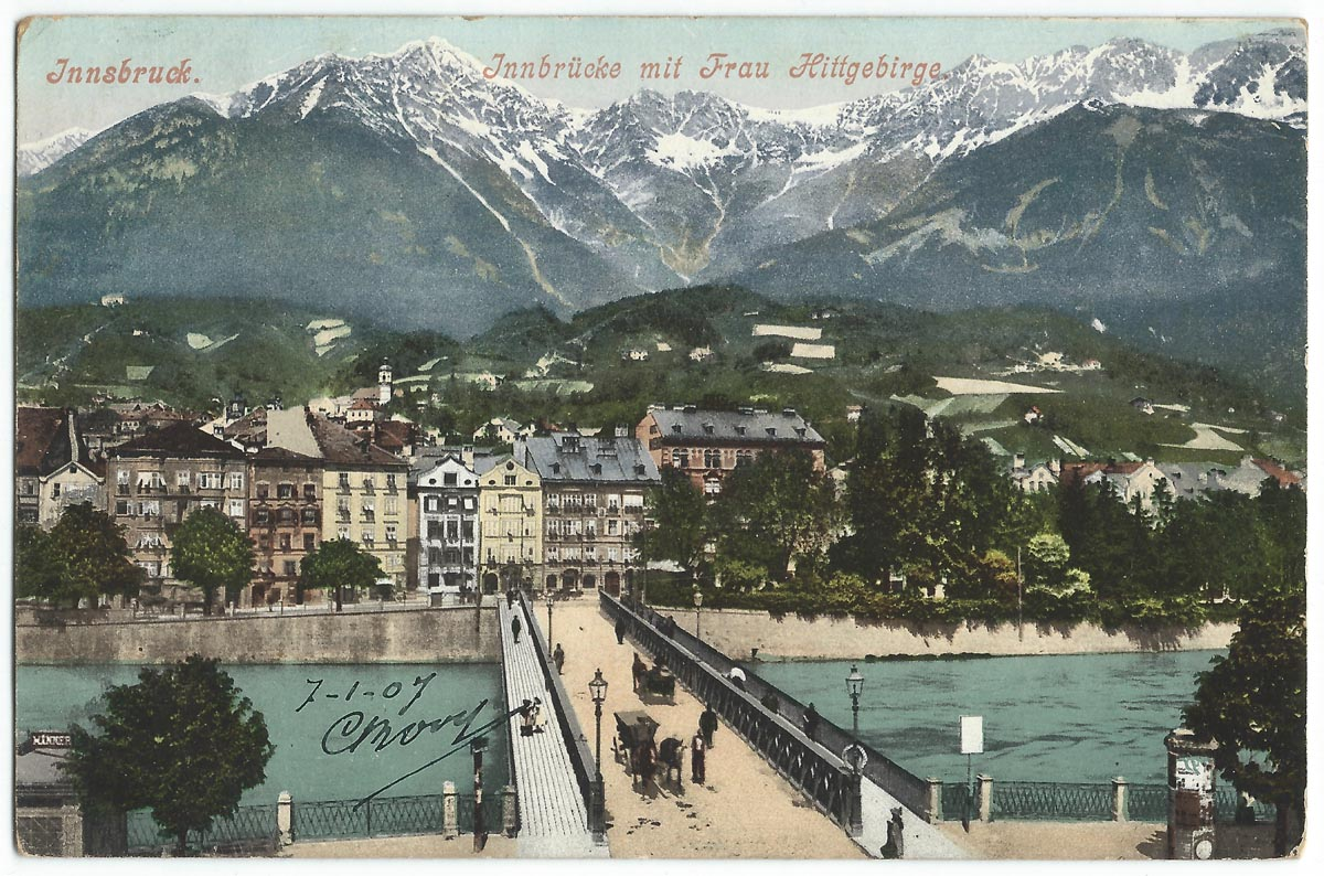 Vue de Innsbruck, au début du XXe siècle.